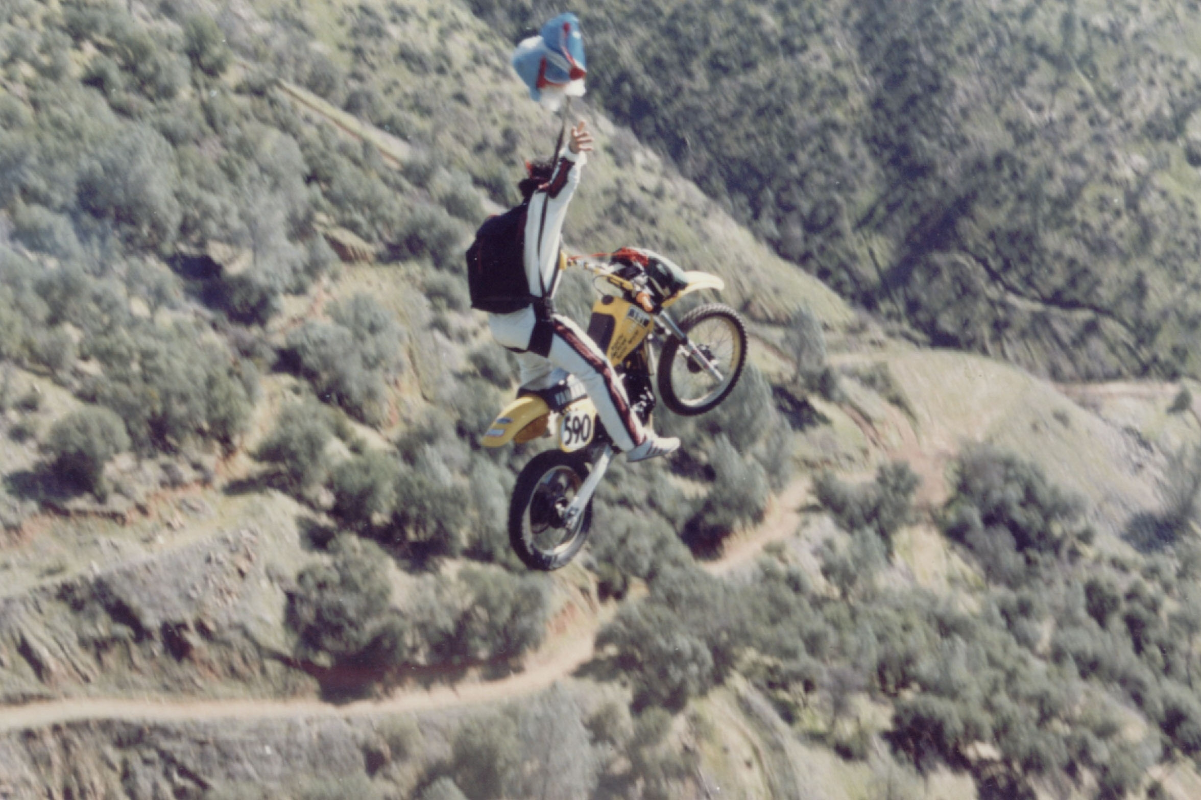 John Carta motorbike BASE jumping